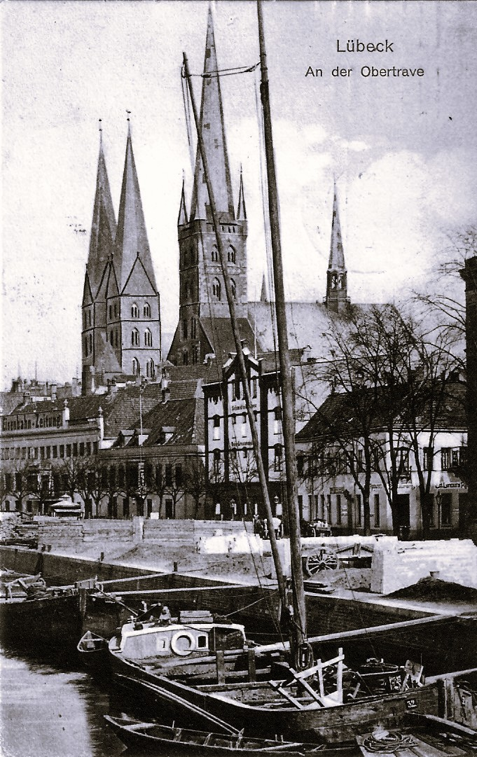 An der Obertrave, 1909 von Hugo Meyer